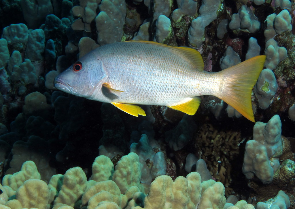 Onespot Snapper, Lutjanus monostigma, at Gota Abu Ramada, Red Sea, Egypt #SCUBA